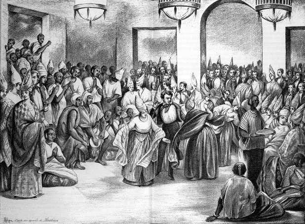 Un bal de Signares (mulâtresses) à Saint-Louis (Sénégal) (illustrations de Côte occidentale d'Afrique du Colonel Frey - Pl. en dble page après p.11 [Cote : Réserve A 200 386]